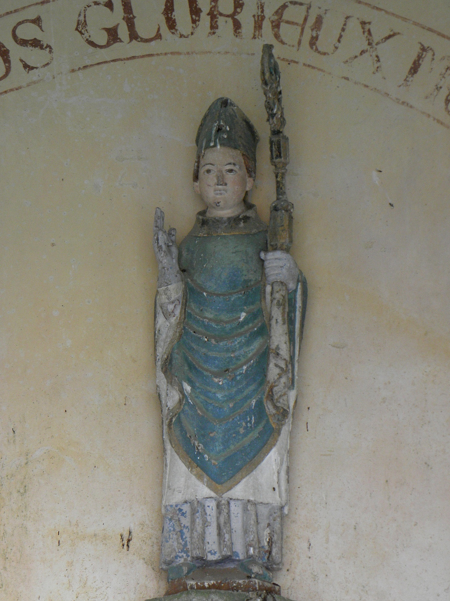 Église Saint-Sezny de Guissény (29). Statue de Saint-Sezny.